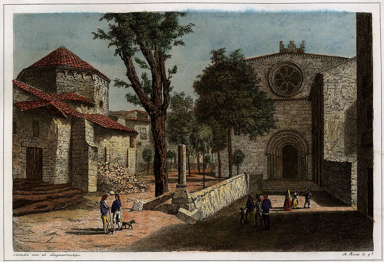 San Pedro de Galligans, en Gerona.